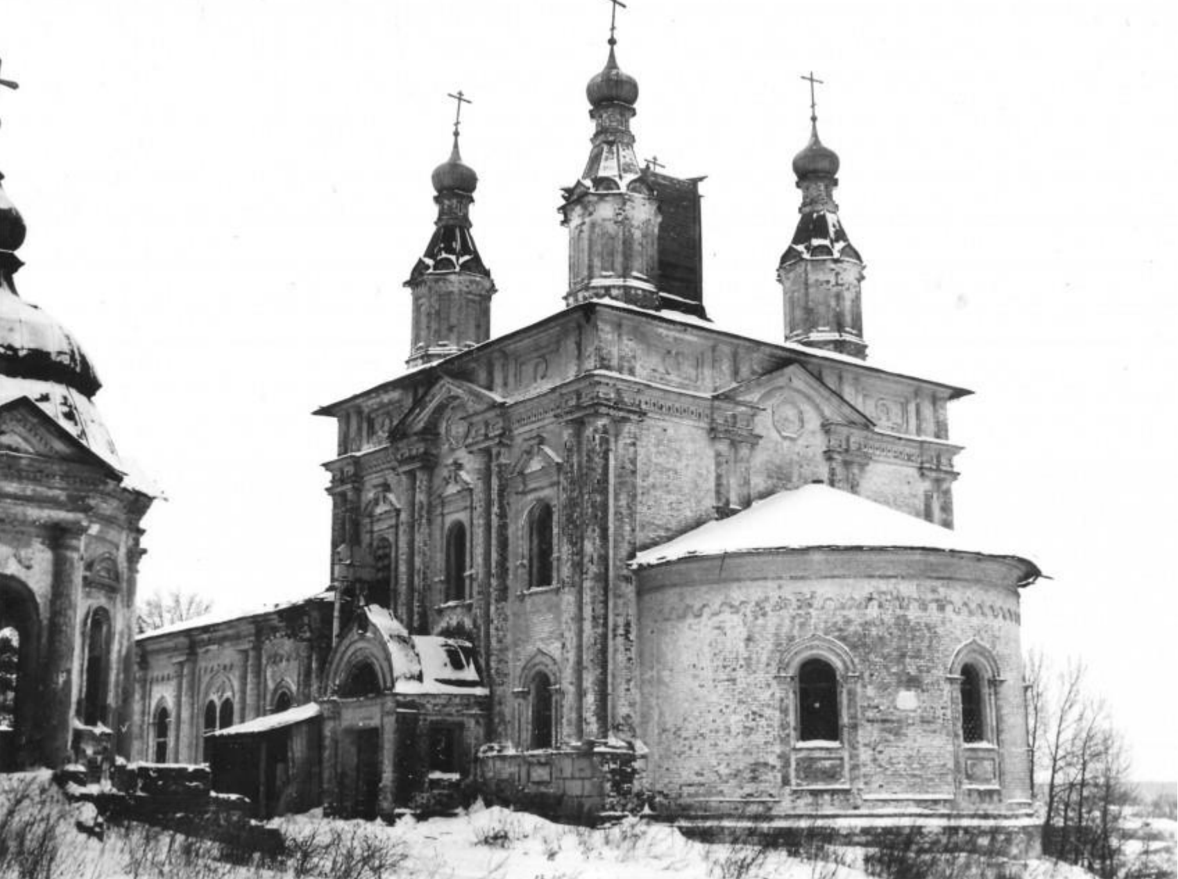 Архивное фото